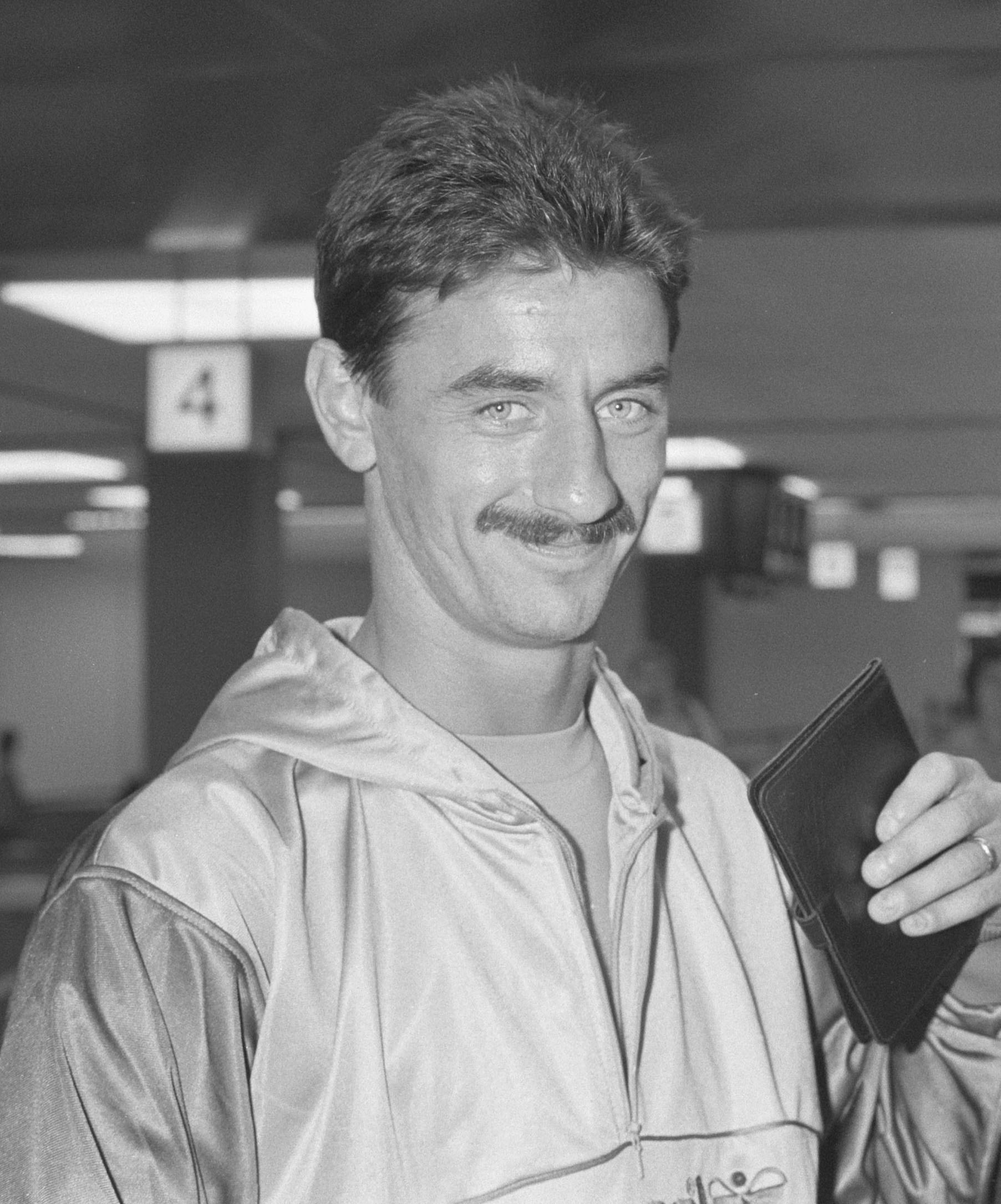 Aankomst elftal Wales; Ian Rush.